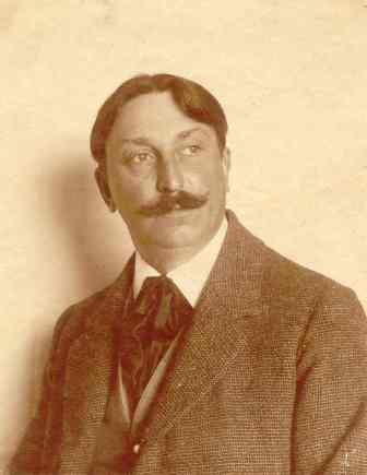 Stjepan Podhorsky (Zagreb, 21.12. 1875. - Zagreb 13. 10. 1945.)